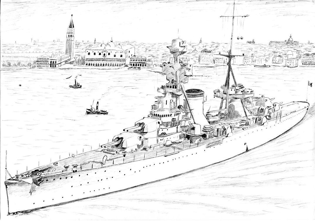 Итальянский тяжелый крейсер Trento в Венеции, скан с рисунка.